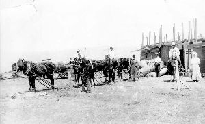 התחלת העבודות באחוזת פוריה